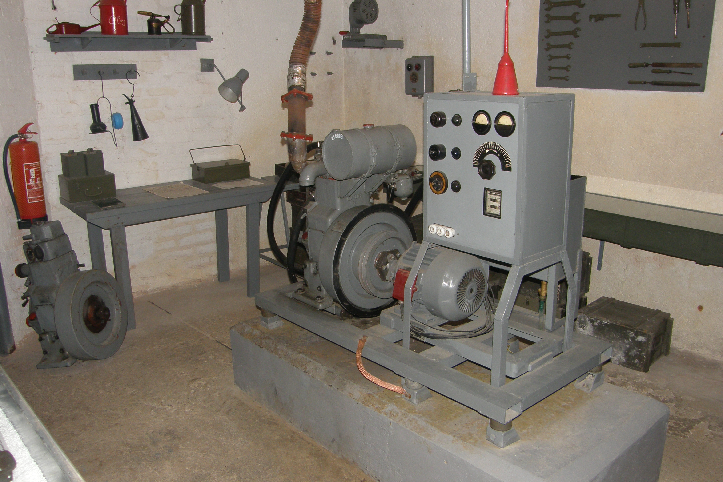 Dieselagregát srubu K-S 14 U cihelny, jedná se o poválečný typ